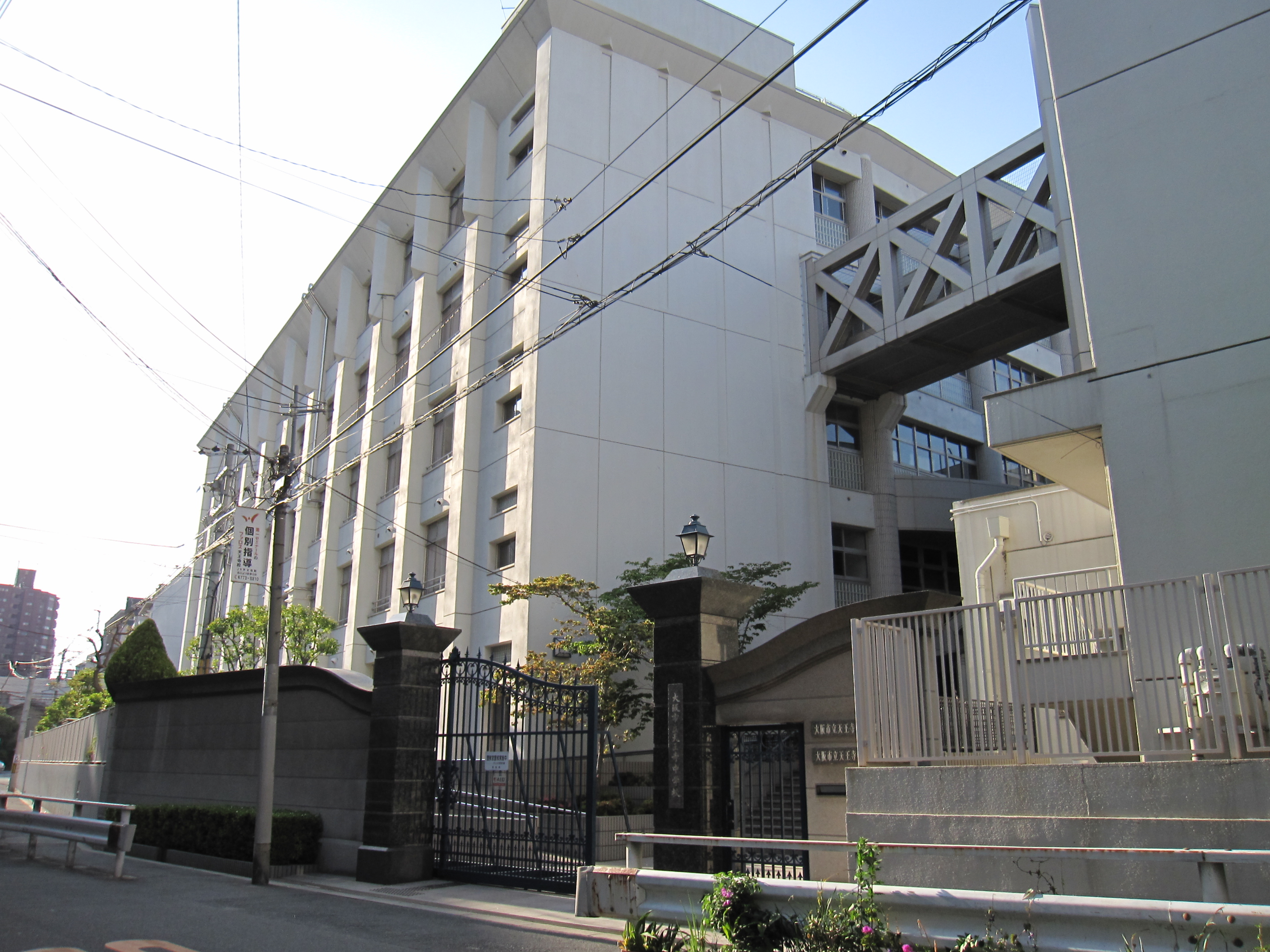 大阪市立天王寺中学校